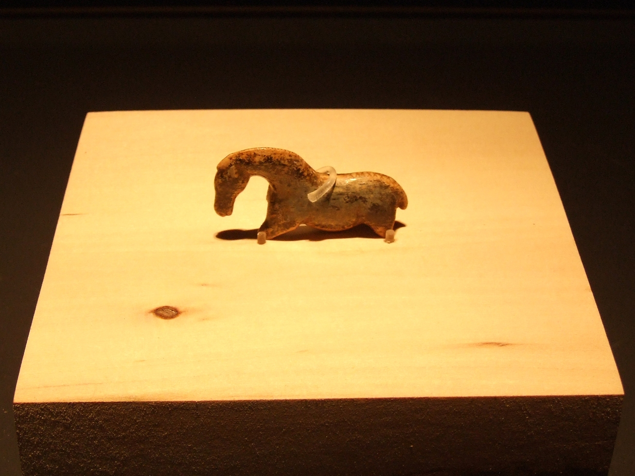 Das Wildpferd vom Vogelherd.